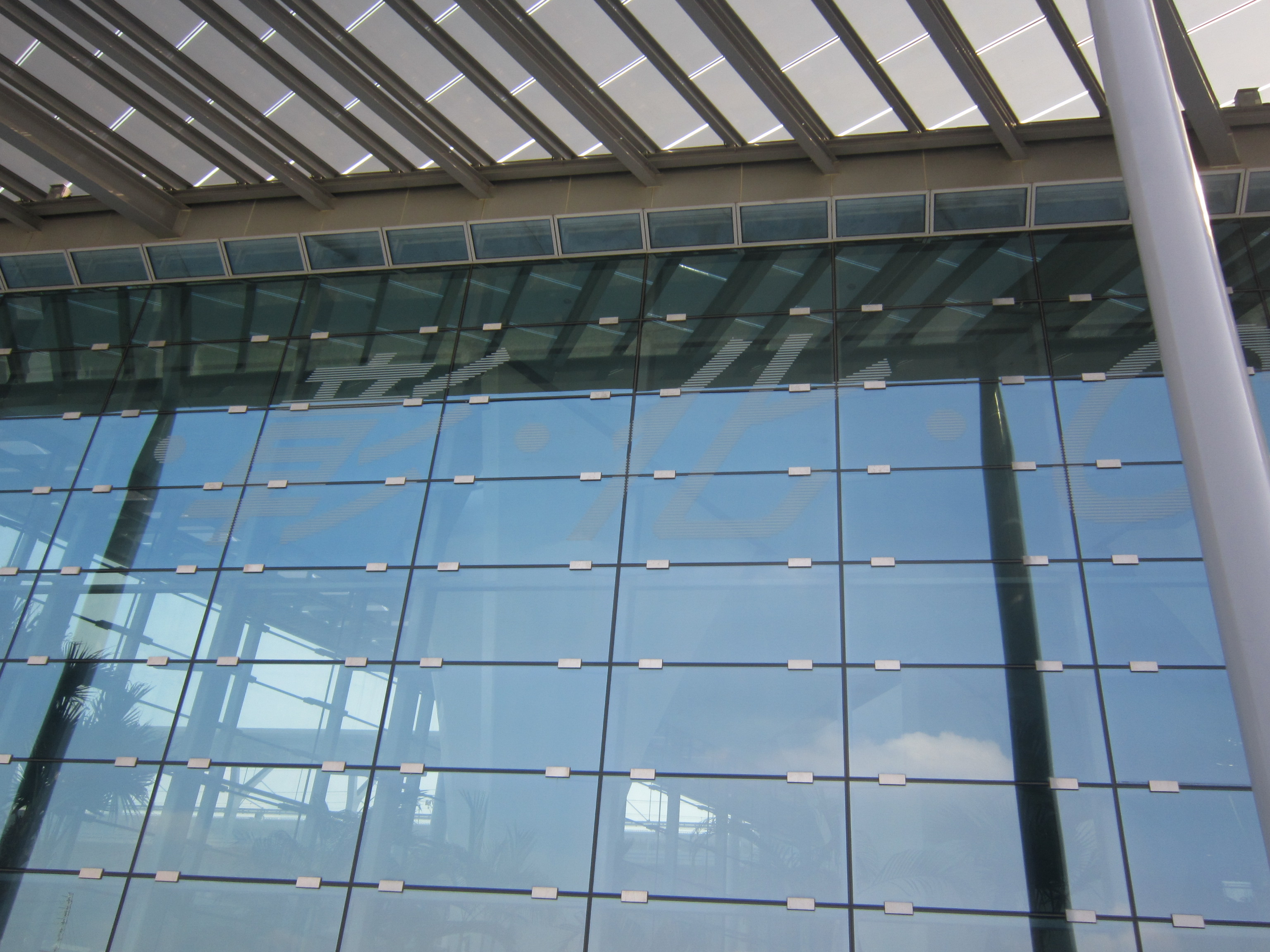 中文（台灣）: 彰化高鐵站玻璃帷幕彰化字樣